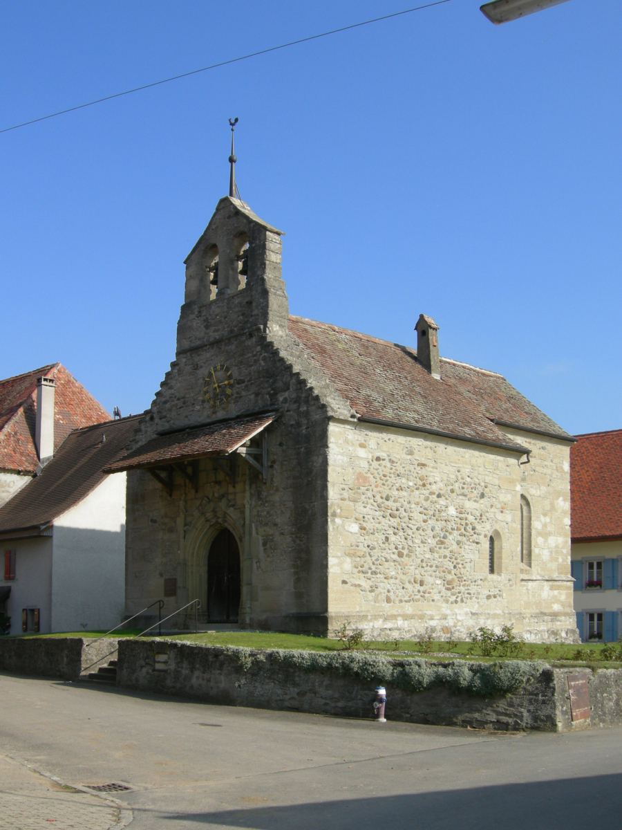 Treytorrens, église paroissiale